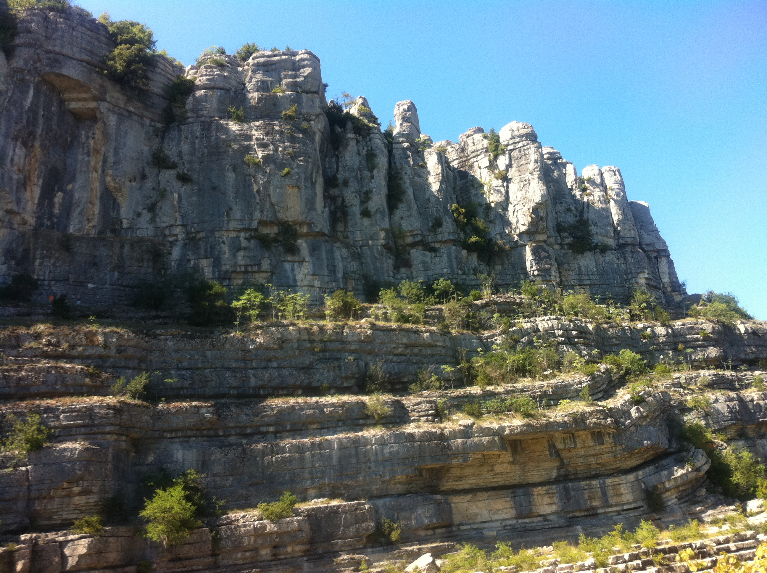 rocher